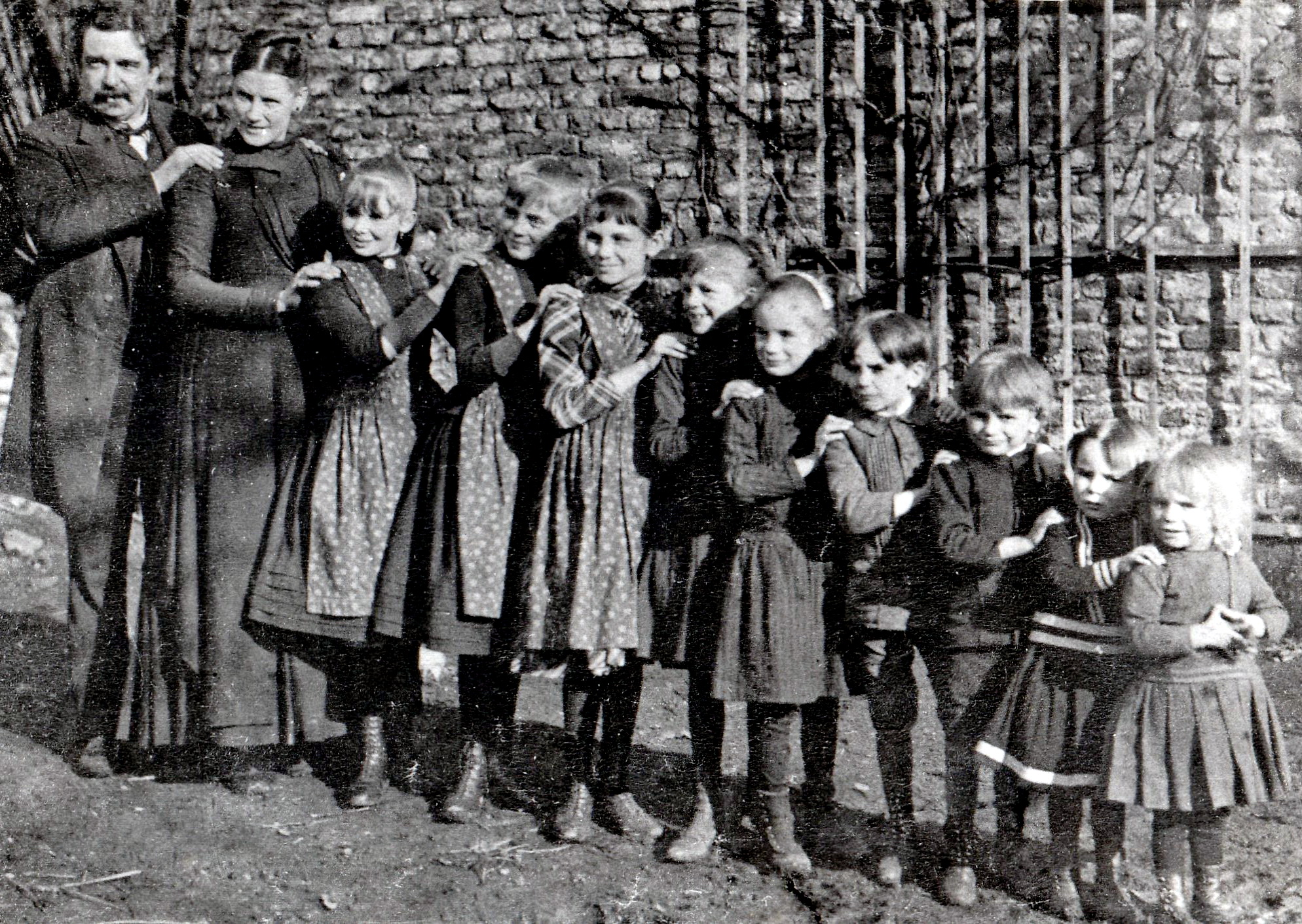 Groepsportret van de brouwersfamilie Marres uit Maastricht in 1892 of 1893. Links: Jan Constant Marres en Angélique Marres-Chambille. Vijfde van rechts: Pauline Marres, later Pauline Plantenberg-Marres (1884-1962), schrijfster. Vierde van rechts: Constant Marres (1883-1944), brouwer. Derde van rechts: Fernand Marres (1885-1957), architect, later gehuwd met Gabriëlle Regout.